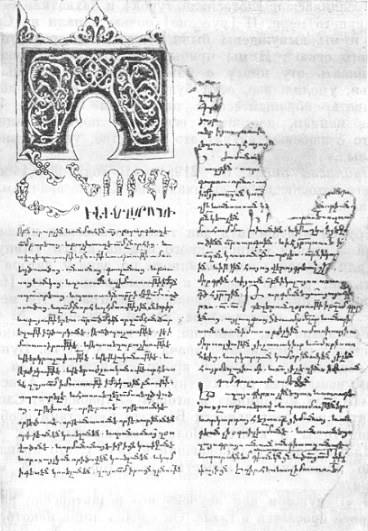 первая страница рукописи «Ненужное для неучей» Амирдовлата Амасиаци первая страница рукописи «Ненужное для неучей» Амирдовлата Амасиаци